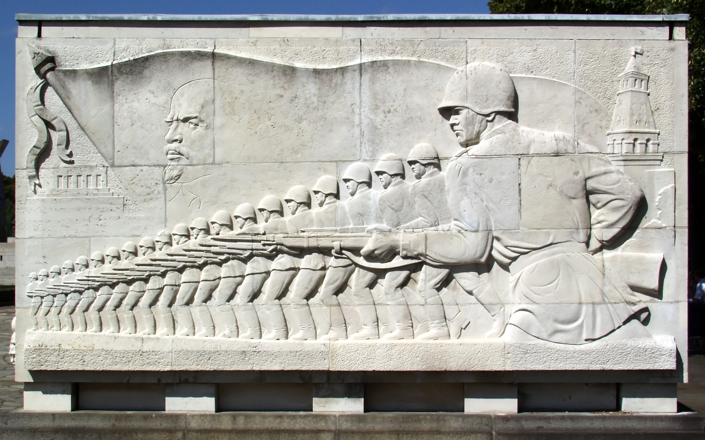 Sowjetisches Ehrenmal im Treptower Park, 4. Sarkophag von Nordwesten in der nördlichen Reihe, Relief an der Südostseite. Thema: „Heldenhafte Armee“. Künstler: Jewgeni Wiktorowitsch Wutschetitsch (Yevgeny Viktorovich Vuchetich).